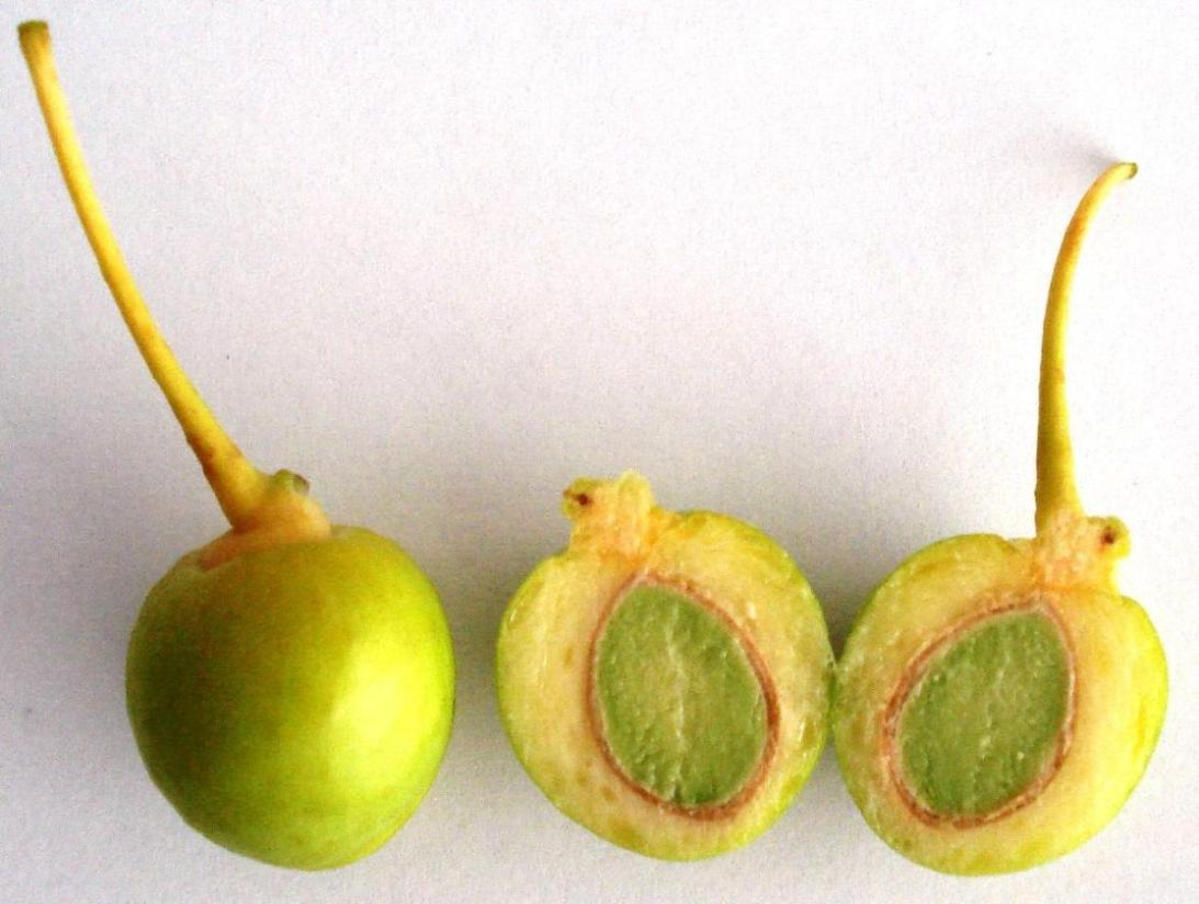 Ginkgo_biloba_-_fruit